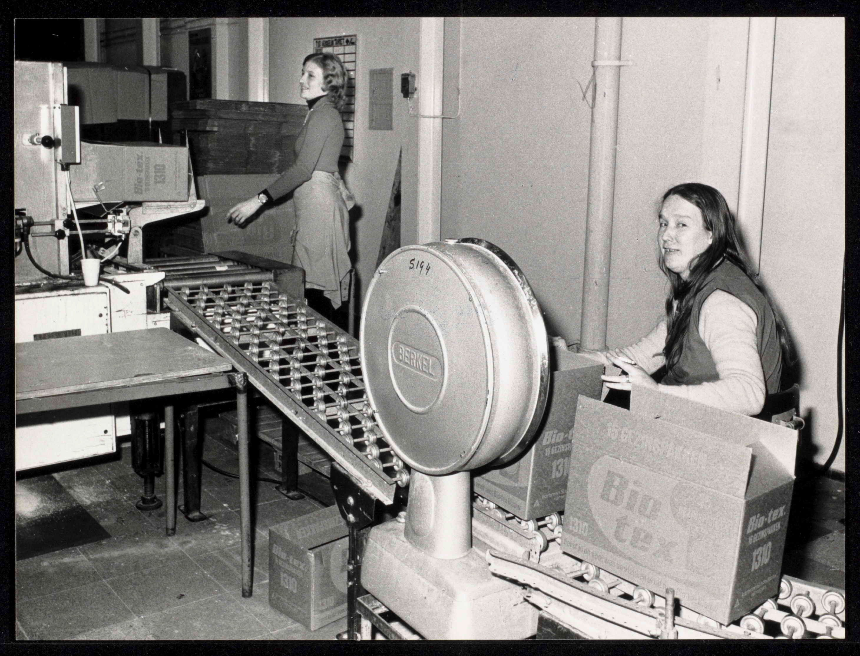 Zeepfabriek Dobbelman: Afdeling poederinpak. M. Angenent (links) en E. Meeuwsen-Litjens (rechts) bij de inpakmachine voor Biotex.